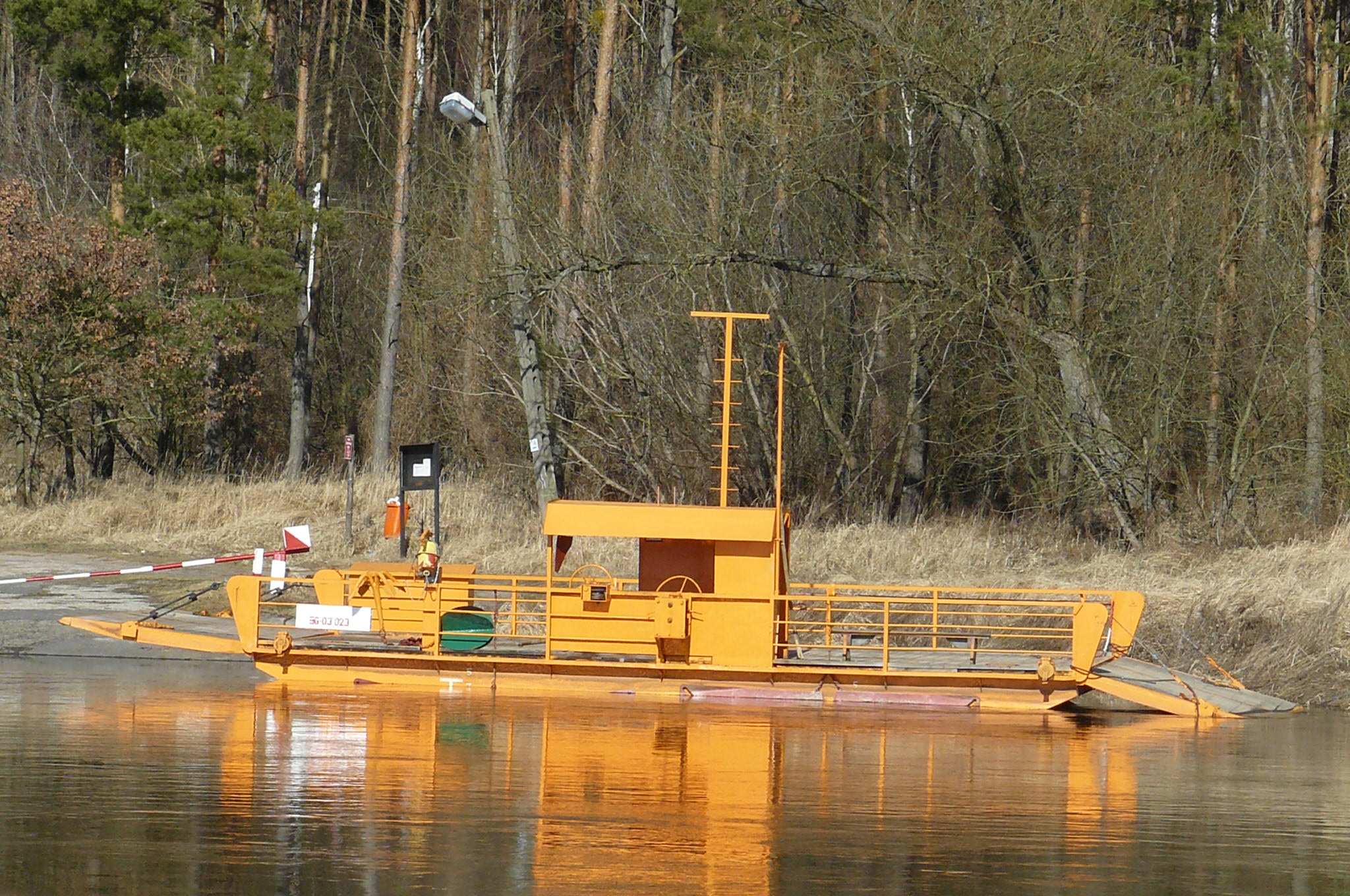 Prom na Warcie - Wartosław.